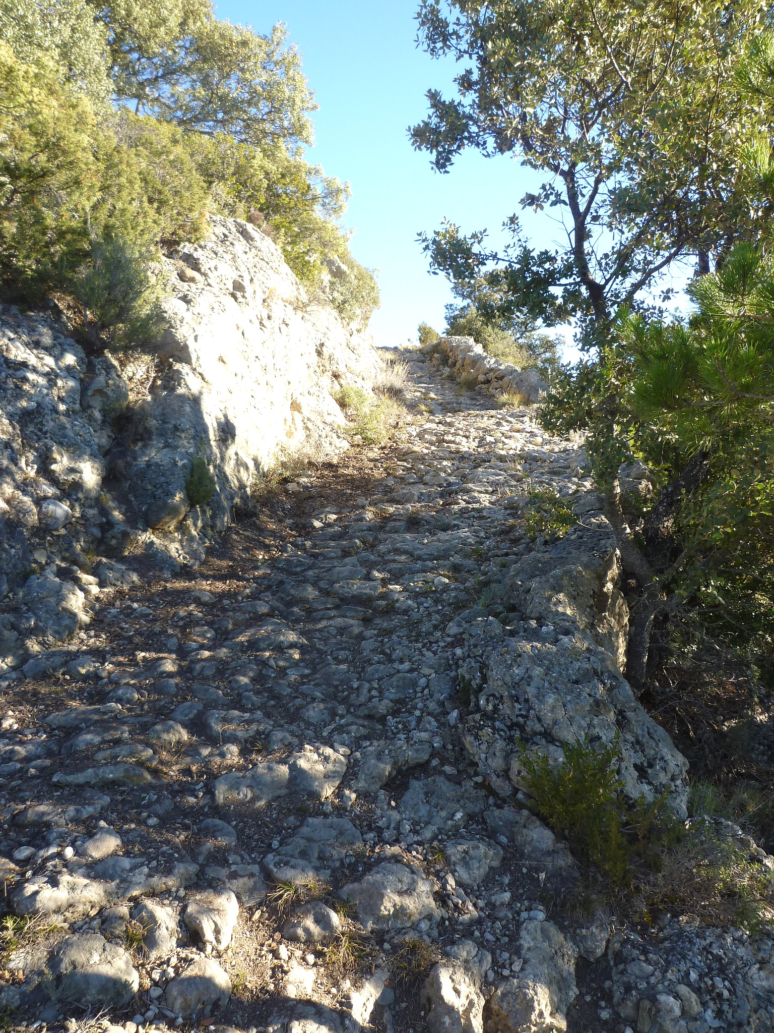 Camí de Cambrils a Oliana (Odèn): grau del Passiró: tram ampli i ben empedrat